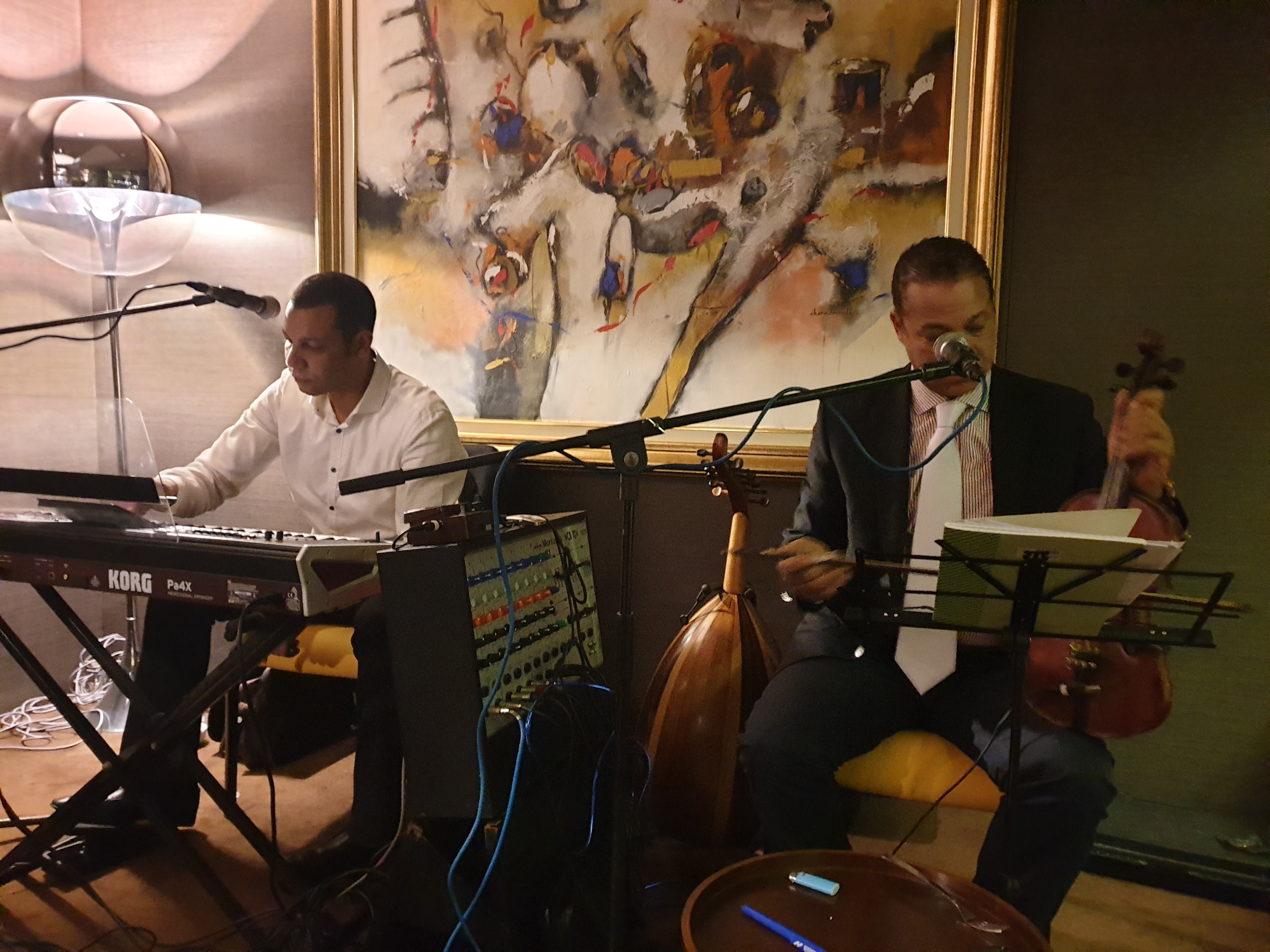 في زمن ليس بعيداً، كانت الموسيقى اليهودية حاضرة بشكل قوي في حفلات الإذاعة والتلفزيون، والمناسبات الاجتماعية والوطنية والأعياد الدينية اليهودية. وتعريف الموسيقى اليهودية هنا نسبة إلى المطربين اليهود، الذين انتموا وعاشوا في المغرب. الاختلاف يكمن ربما في جرأة الأغاني التي طرحها هؤلاء المطربون في الساحة، والتي ما زالت تغنى إلى اليوم في حفلات الزفاف مثلاً. كان اليهود المغاربة نجوماً في الغناء الشعبي، خصوصاً في الأربعينات والخمسينات، قبل أن يهاجر غالبيتهم إلى بلدان عدة بعد الصراع في فلسطين وما نشب عنه. وهذا ما أدّى إلى اختفاء هذه الموسيقى تدريجياً من الساحة الفنية المغربية، إلى أن ظهر مؤخرا فنانون مغاربة يهود، حاولوا إحياء هذا التراث خصوصاً عبر الموسيقى الأندلسية، التي تعود إلى القرون الوسطى، والتي يشترك فيها المسلمون واليهود، الذين طردوا آنذاك من الأندلس وذهبوا إلى المغرب. هذه الموسيقى كانت رمزاً للتعايش والسلام بينهم، وكانوا يغنون بالعربية والأمازيغية والعبرية السفاردية، التي يستخدمها اليهود القادمون من إسبانيا وإيطاليا، وهي عبارة عن قصائد غزل وغرام، وقصائد دينية ذات طابع طربي أصيل، ولها مناسبتها الخاصة حتى يومنا هذا.